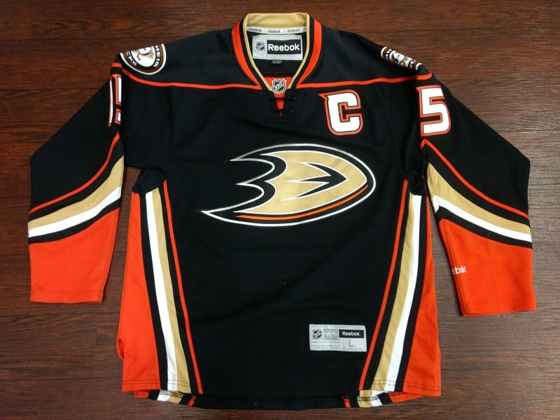 アナハイムダックスホームゲーム用ジャージ(3代目)。アウェイ用はベース色が白に変わる。2014-2015シーズンから使用。